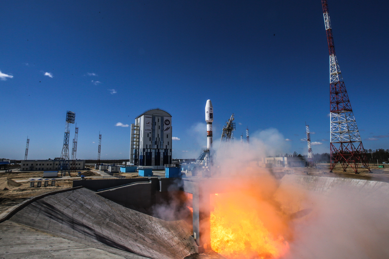 28 апреля состоялся первый пуск с новейшего гражданского космодрома Восточный